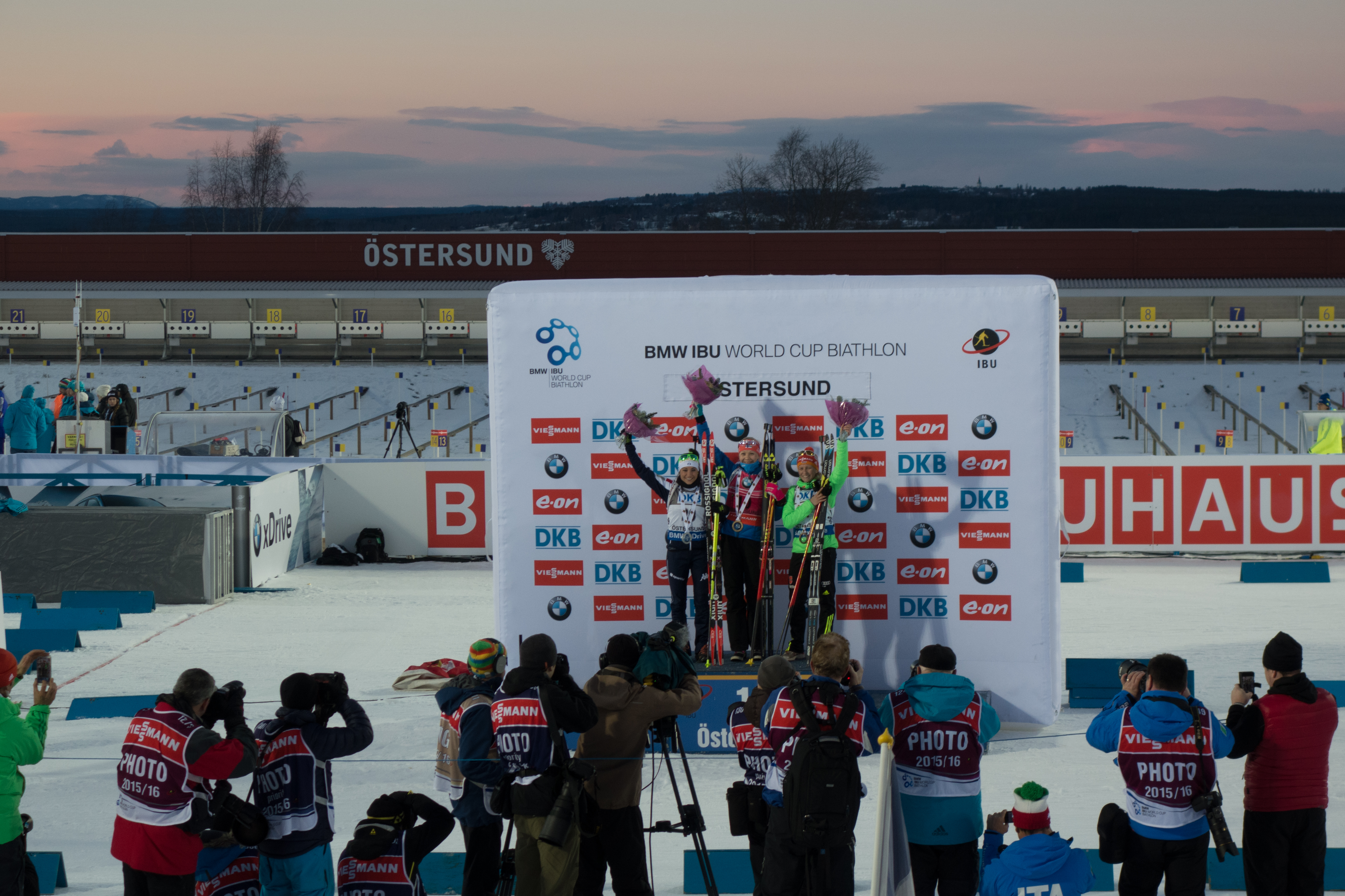 Prispallen vid damernas jaktstart i Östersund 2015 1 Mäkäräinen 2 Wierer 3 Hildebrand